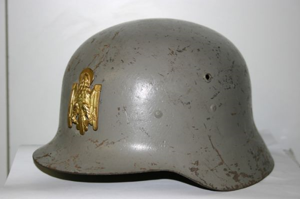 Casco "Z" inspirado del Stahlhelm alemán con insignia de la Policía Armada